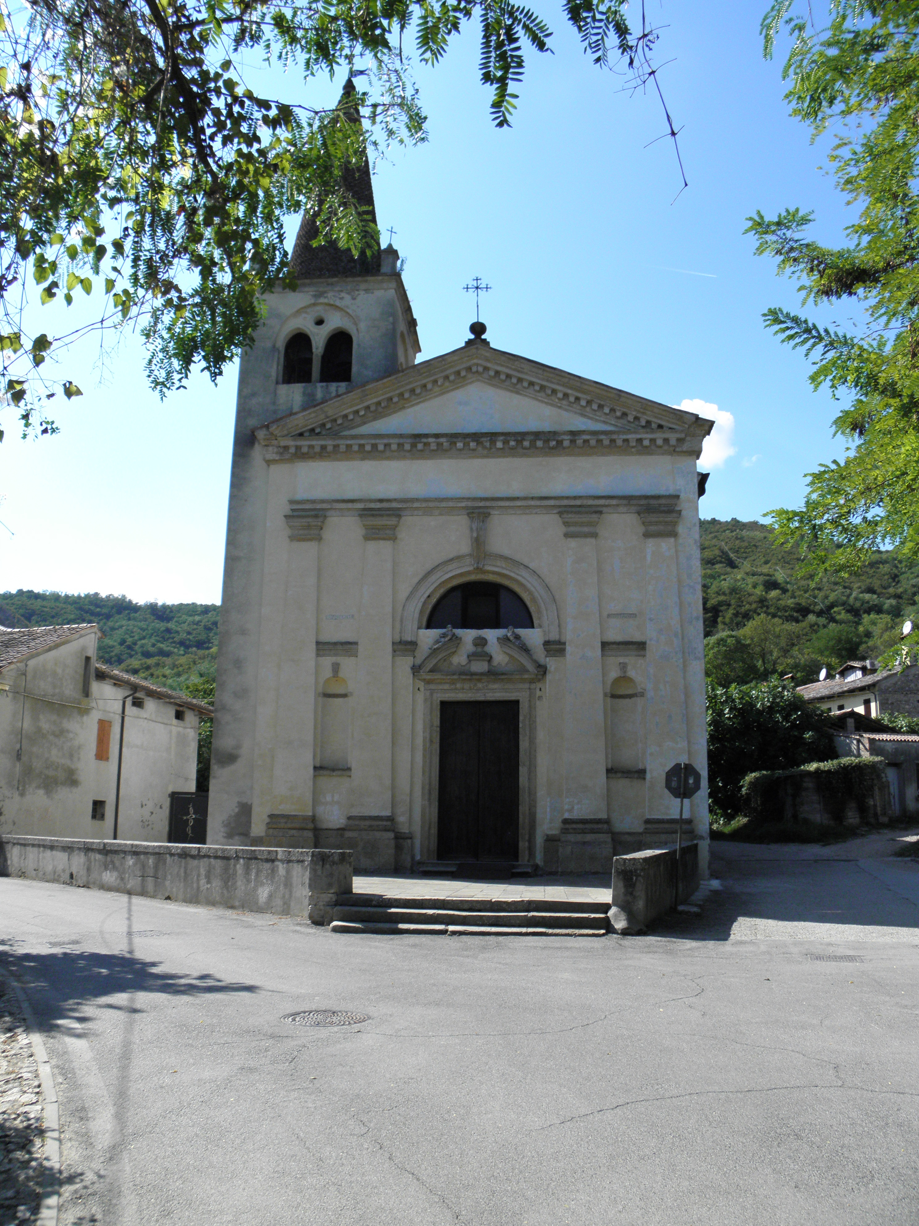 Valsanzibio, frazione di Galzignano Terme: la chiesa di San Lorenzo.